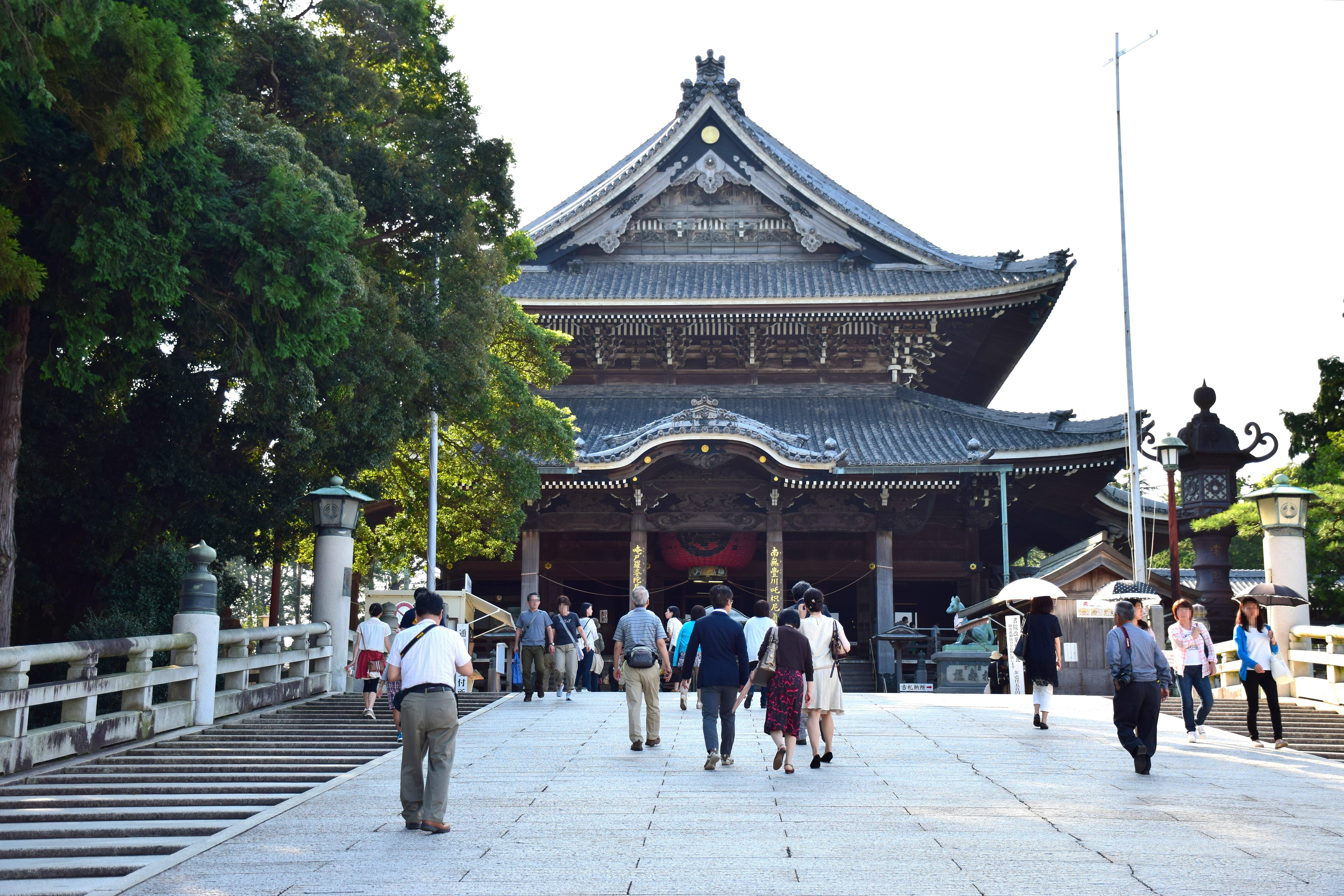 豊川稲荷本殿